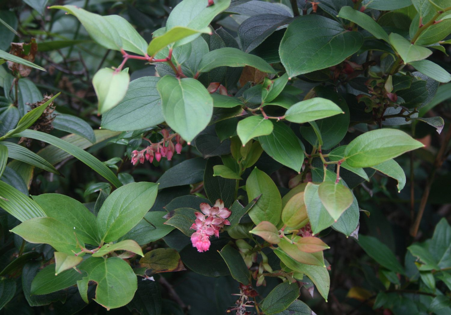 Gaultheria erecta, Heidekrautgewächse (Ericaceae) - Costa Rica: Prov. Alajuela, Parque Nacional Volcán Poás, 2550-2600 m